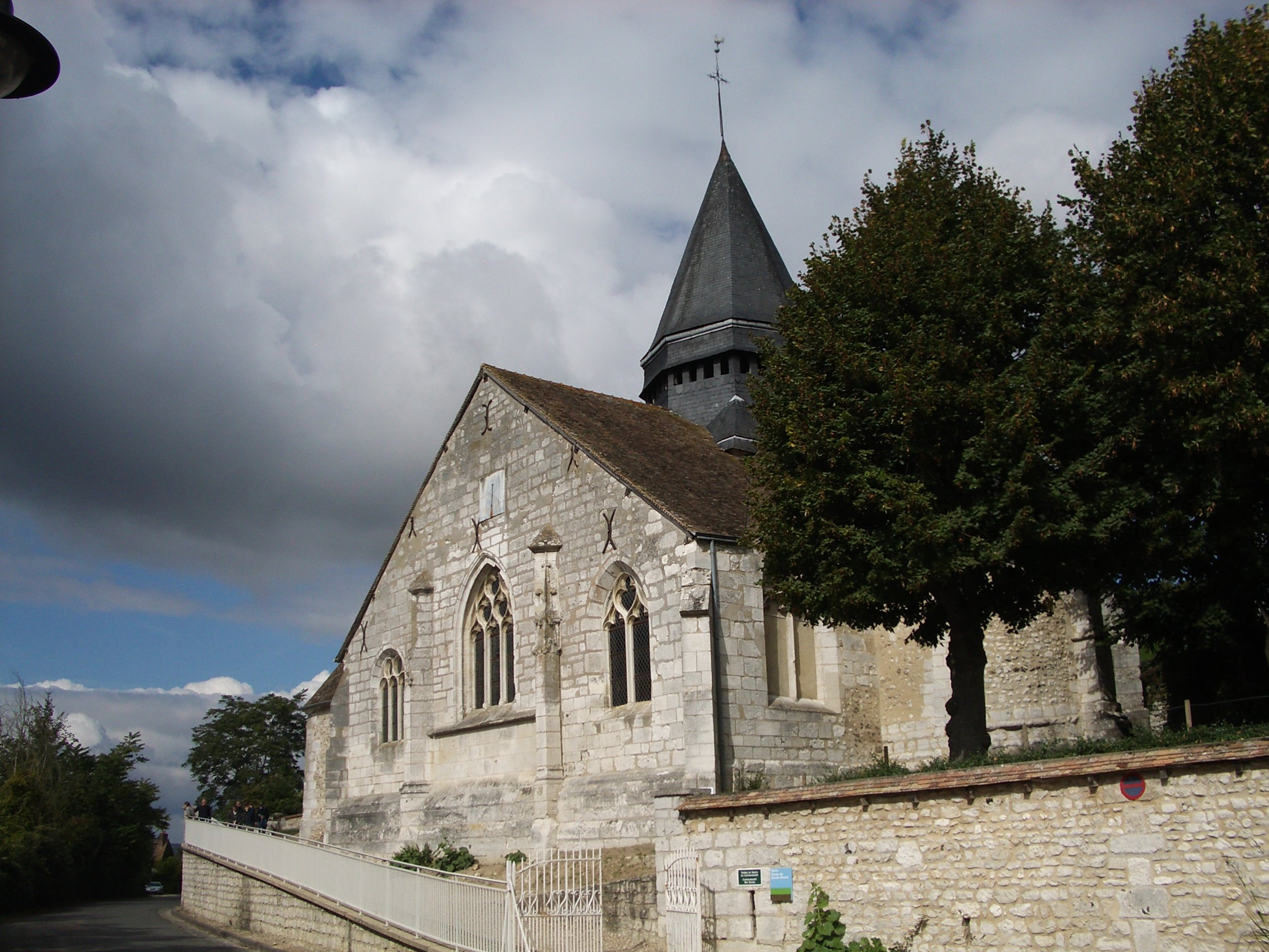 L'église sainte Radegonde à Giverny (Eure)